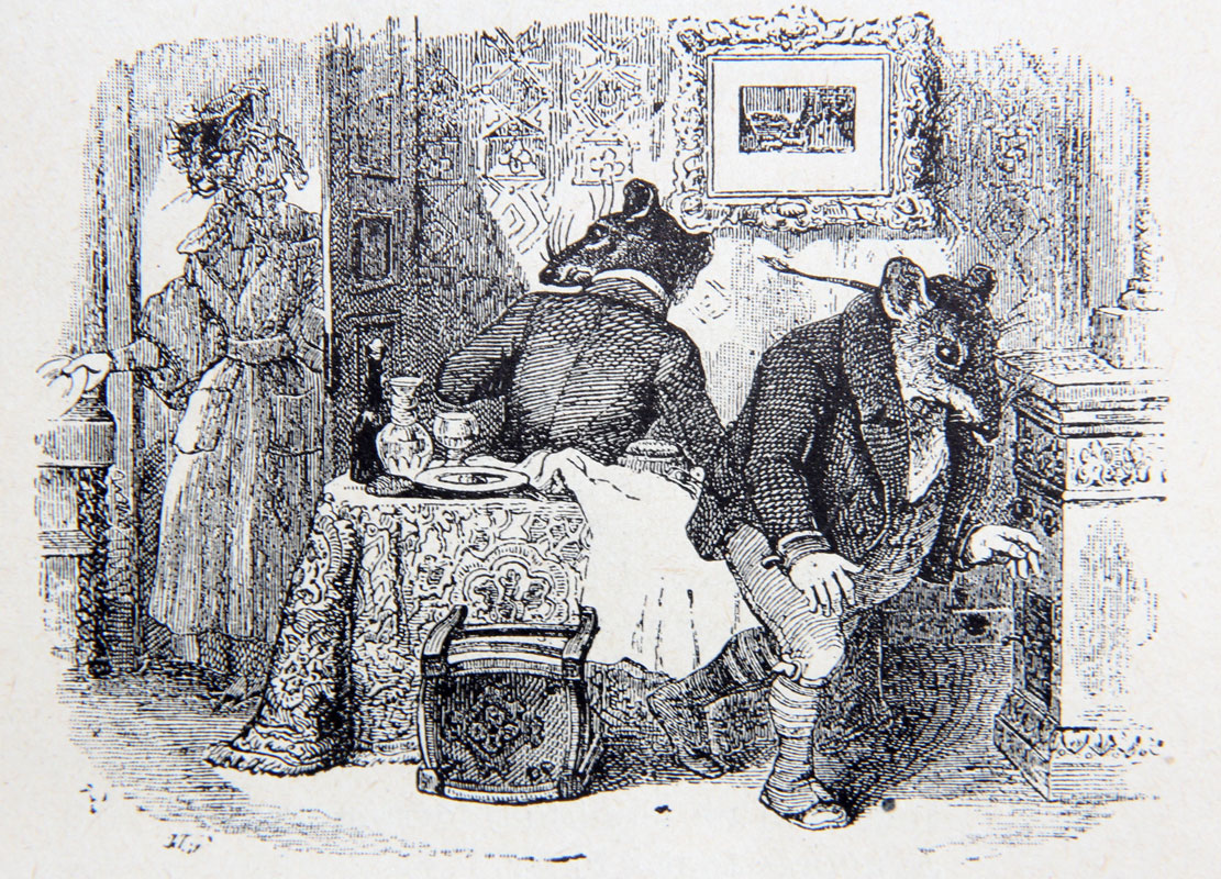 J.J. Grandville. Illustrations des Fables de La Fontaine. 1838-1840.